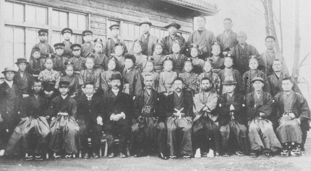 Yōko Sayuri (Japanese, *1901, †1986)